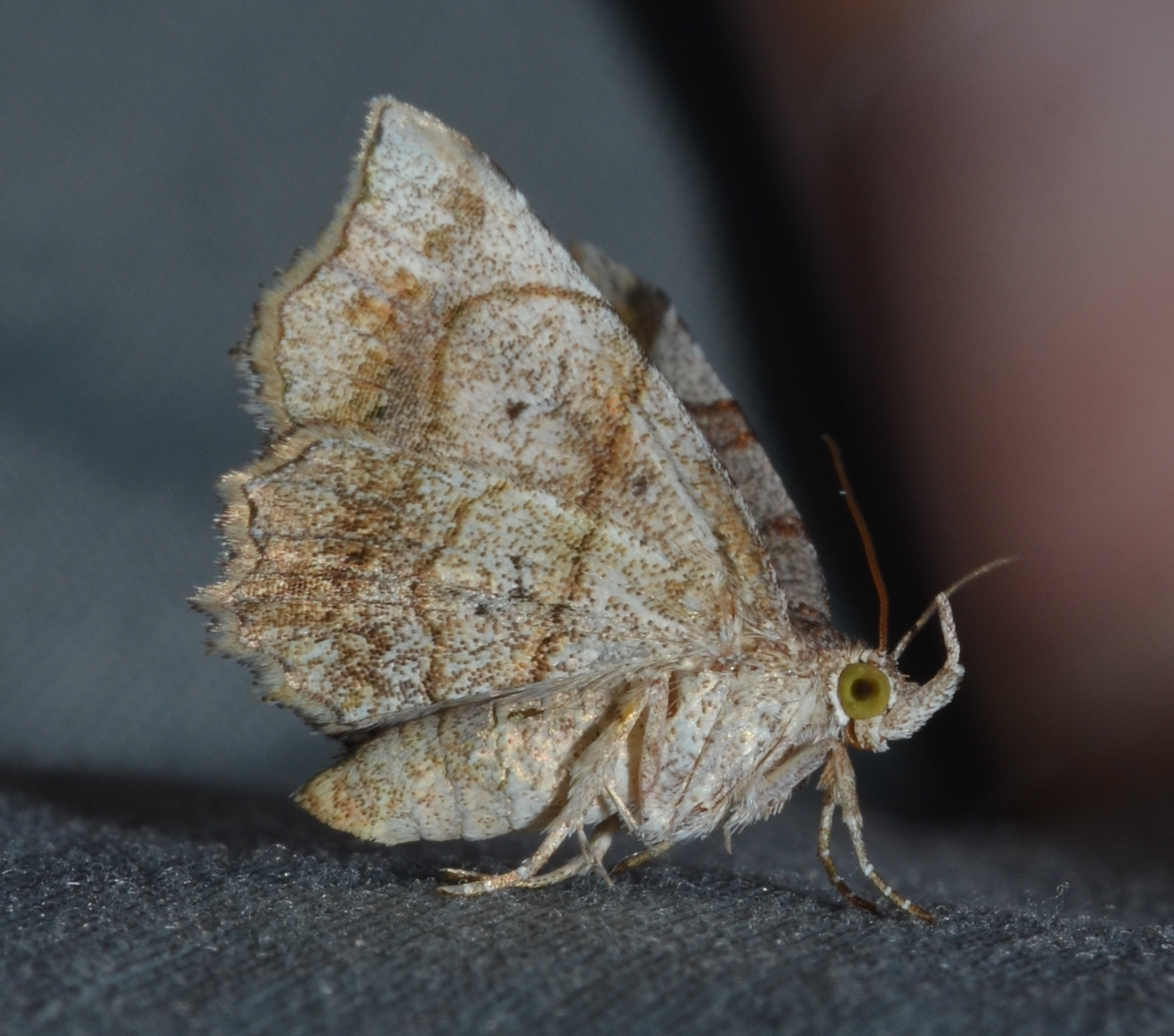 Ozark, MO 6/19/15- 6/21/15